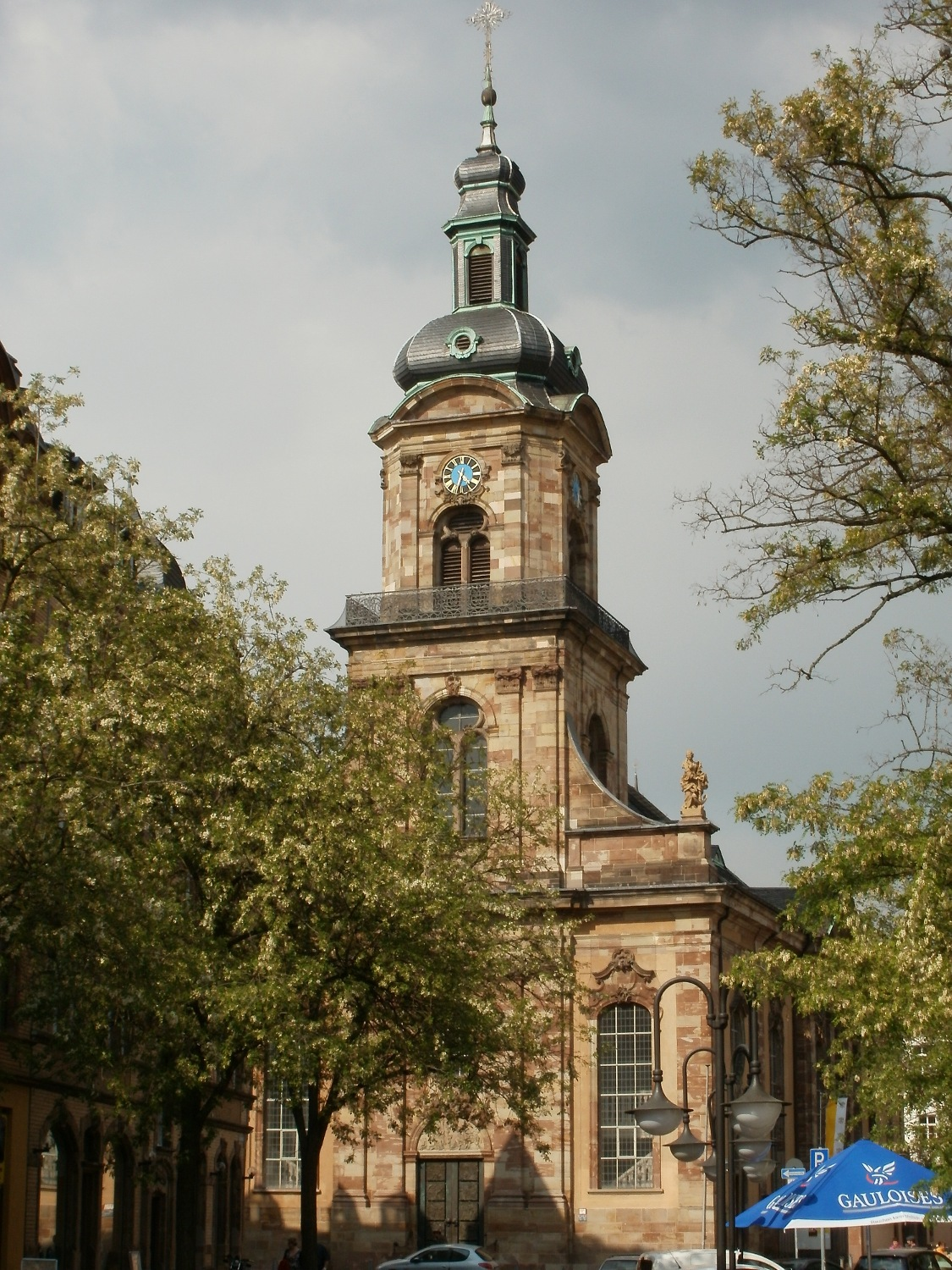 Basilika St. Johann (Saarbrücken)